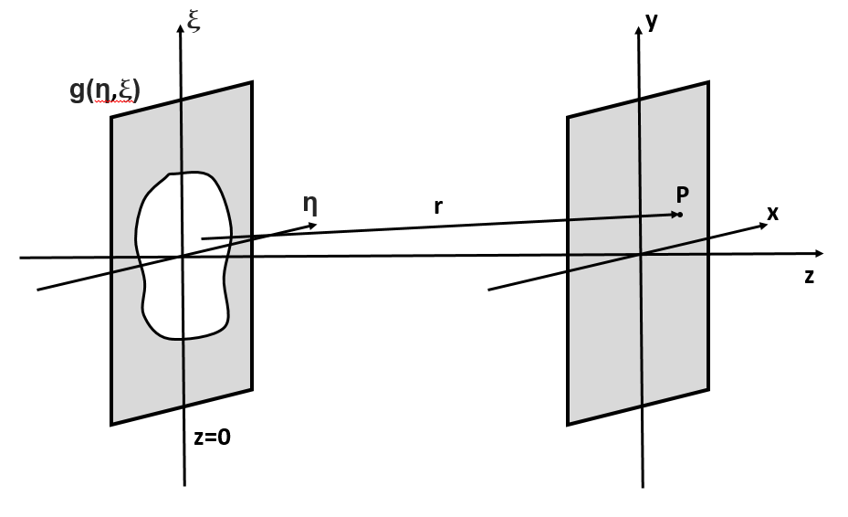 Za Kirchoffovo uklonsko formulo